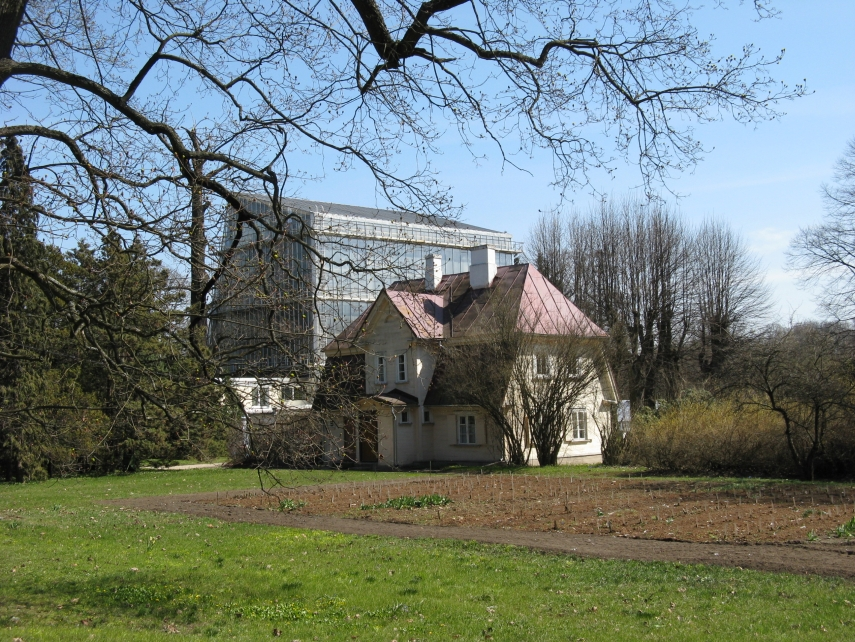 Botāniskais dārzs, Rīga